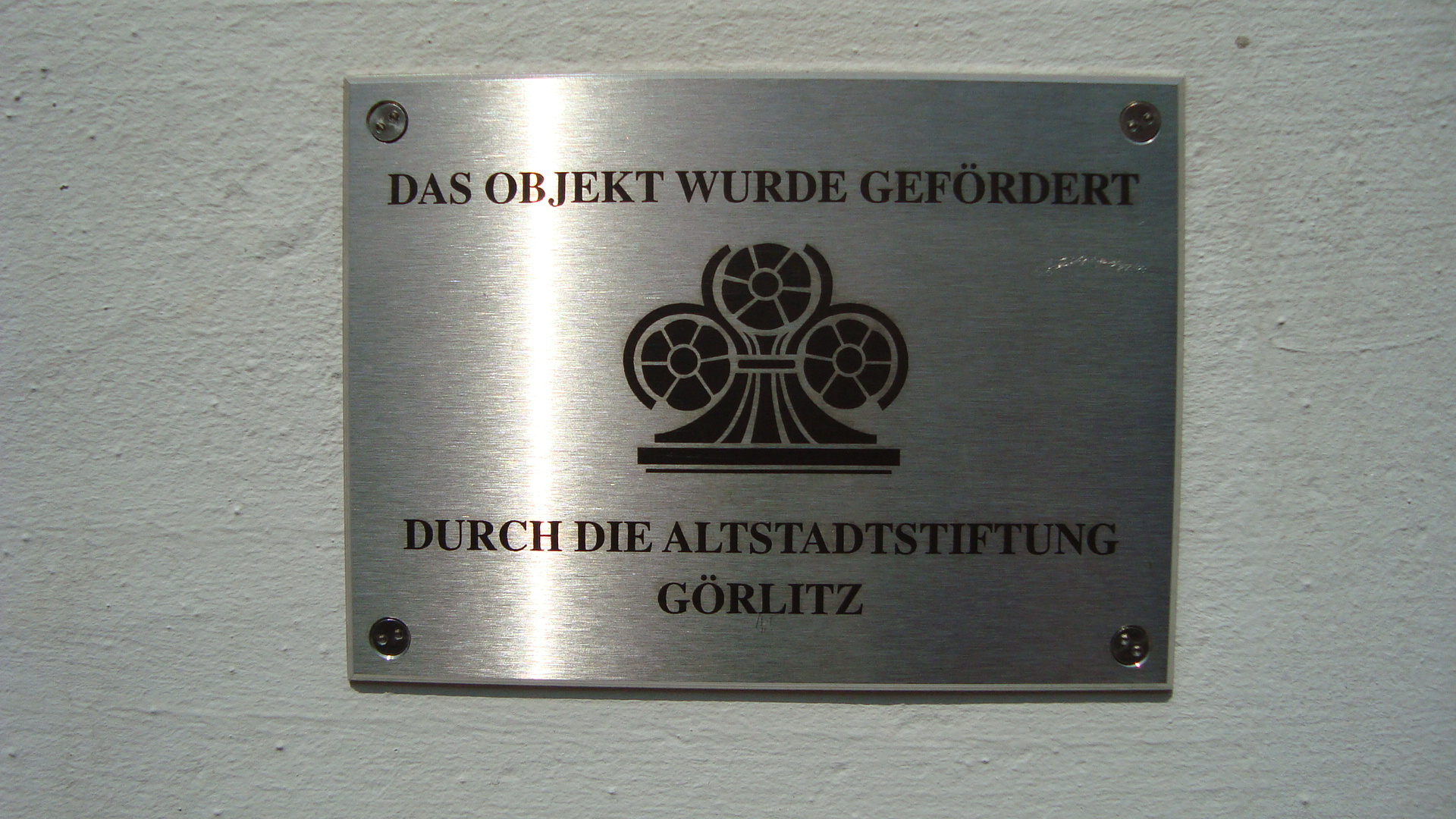 Plakette "Das Objekt wurde gefördert durch die Altstadtstiftung Görlitz", 2011